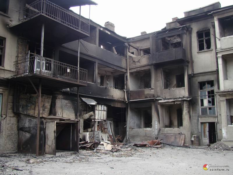 Фото разрушенного города Цхинвал от газеты "Республика 18 August 2008. Tskhinval after Georgian artillery bombardment